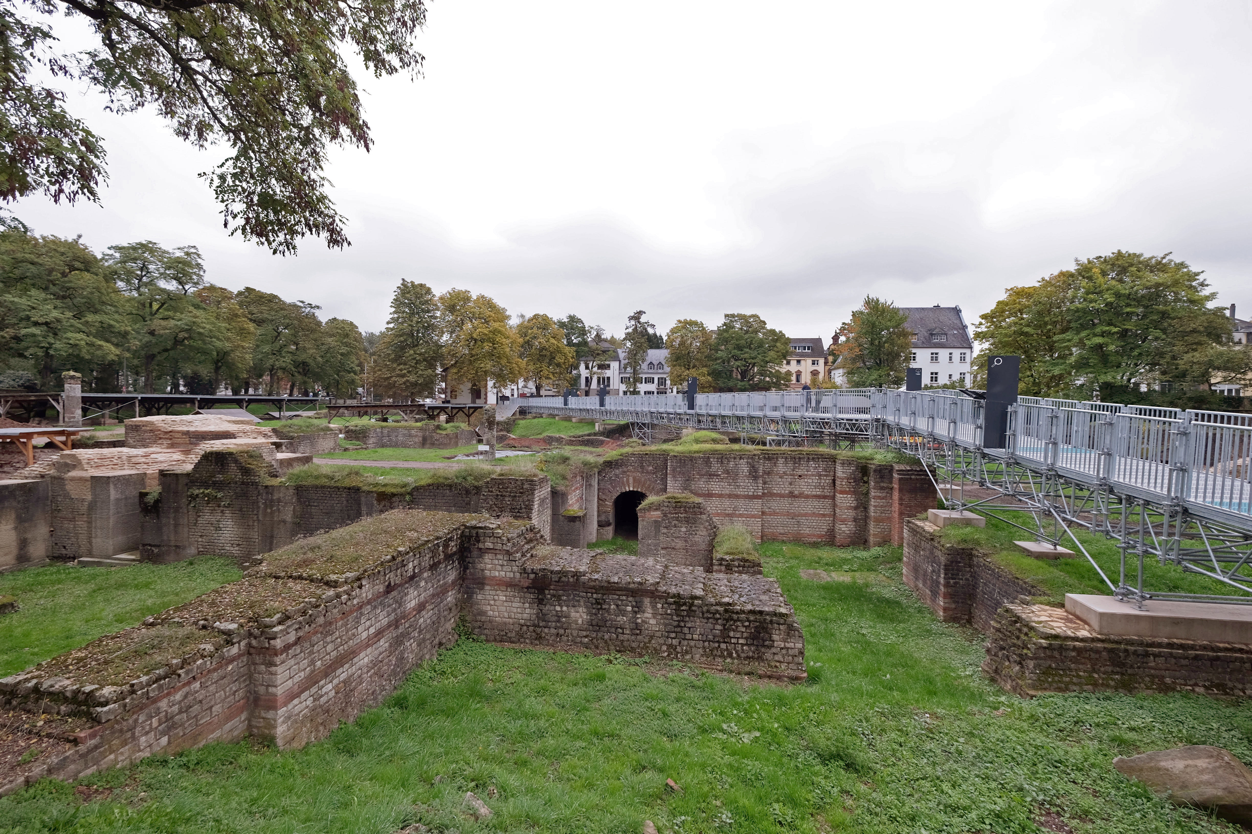 Trier Süd, 54290 Trier, Germany